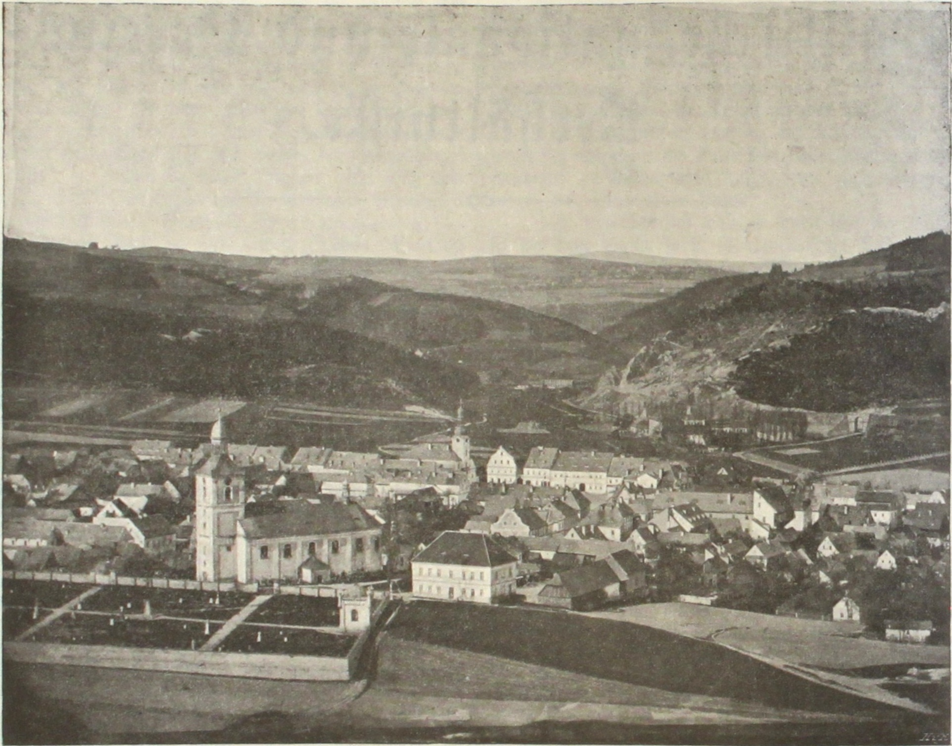 Hodkovice v roce 1860. Fotografie z Kostelního vrchu.